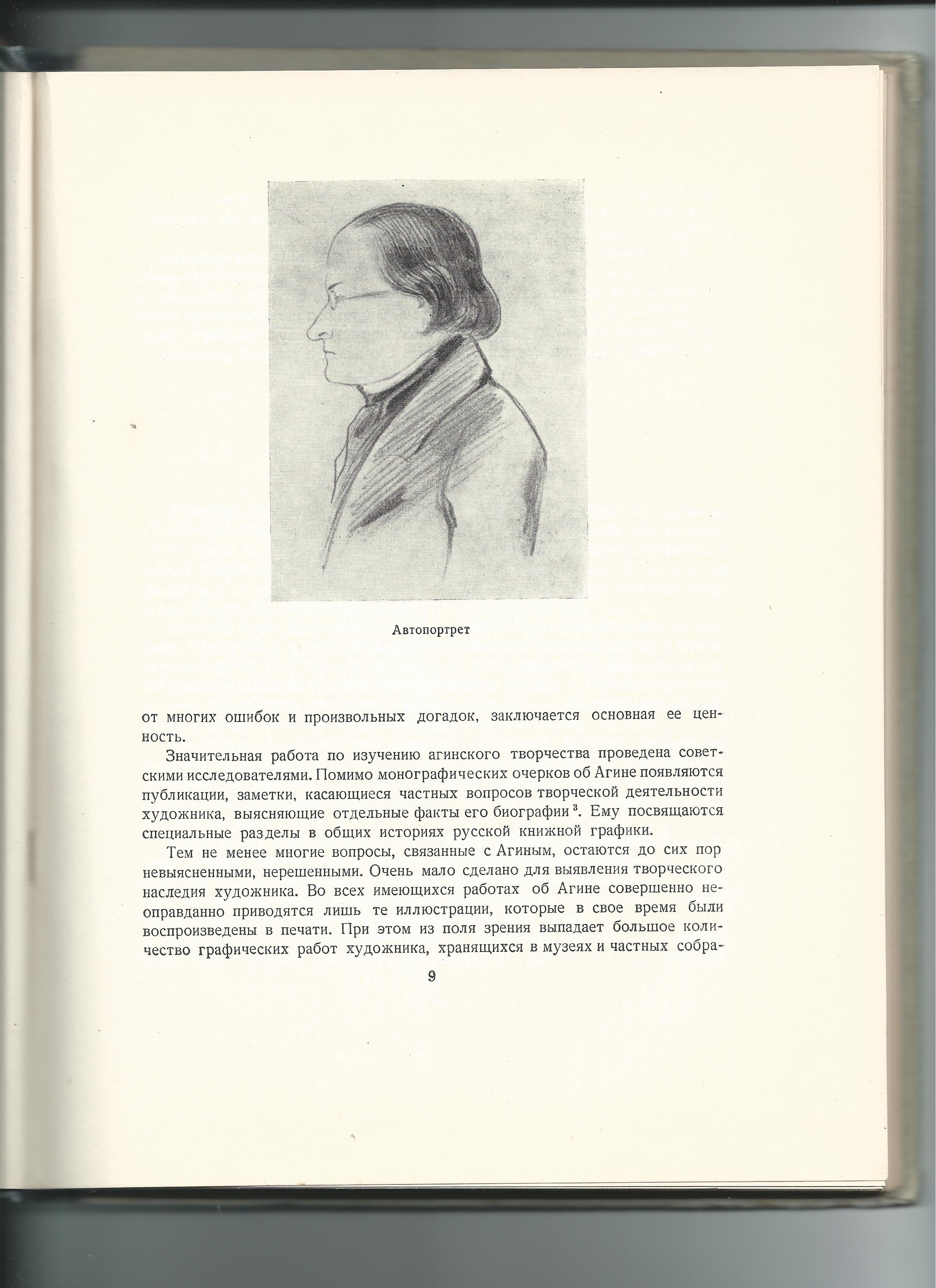 сканы Портрета и Автопортрета, позаимствованные из монографии Г.Стернина «Александр Алексеевич Агин» (М., «Искусство», 1955)